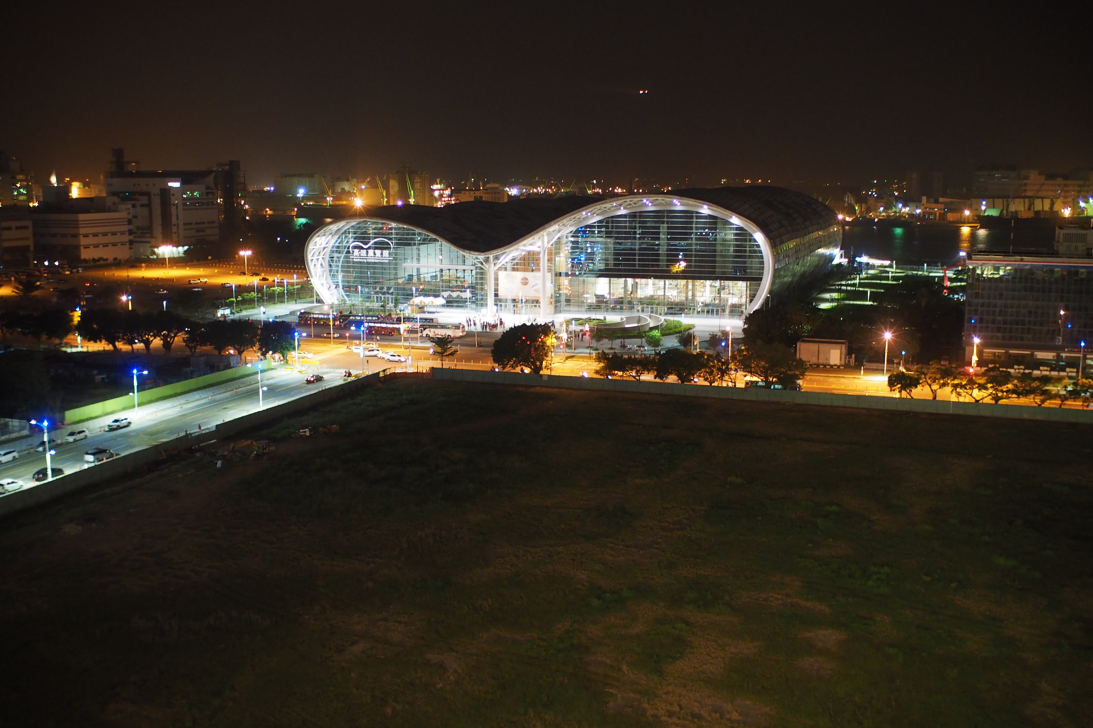 高雄展覽館夜景。